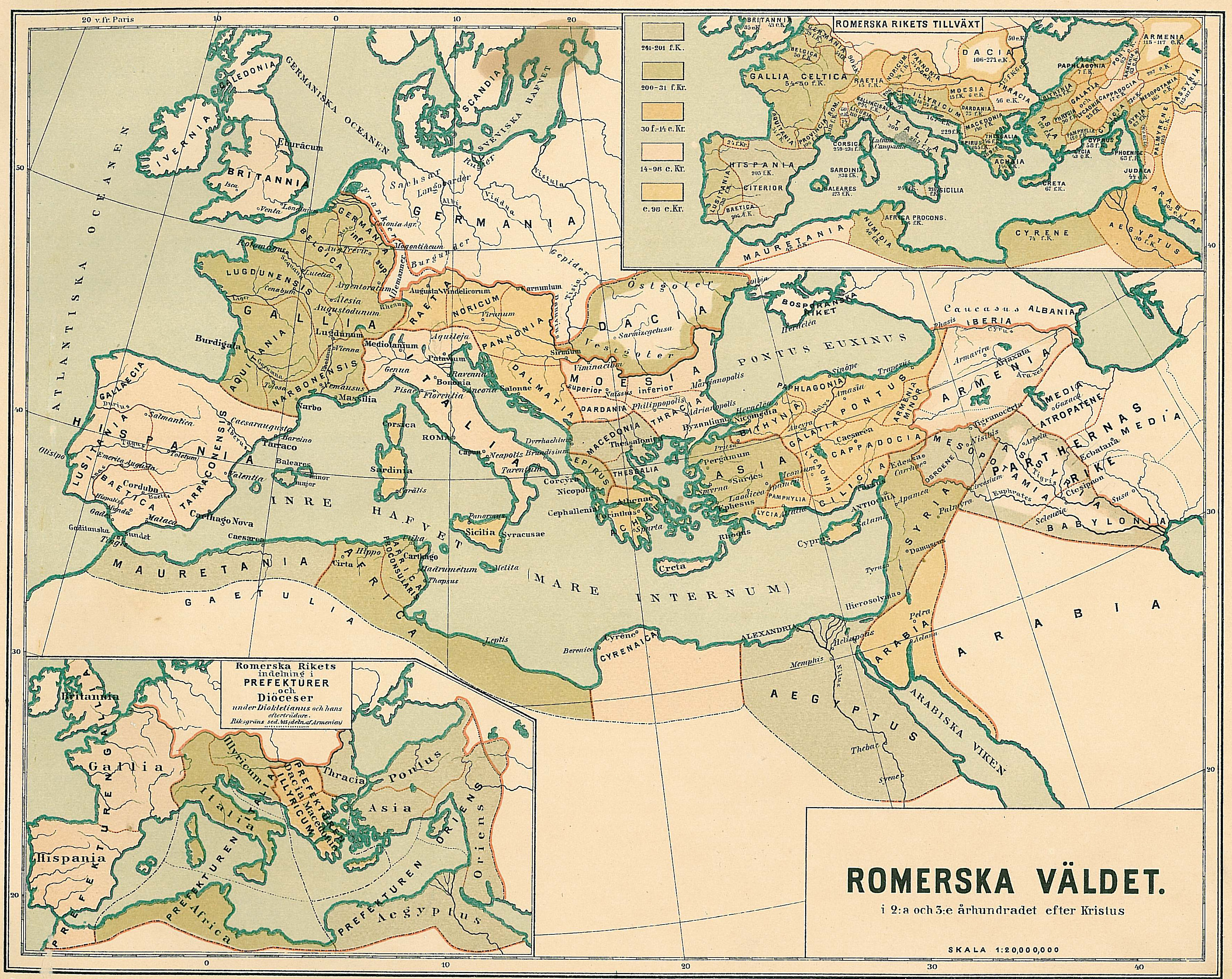 Romerska rikets utbredning på 200- och 500-talet e.Kr.